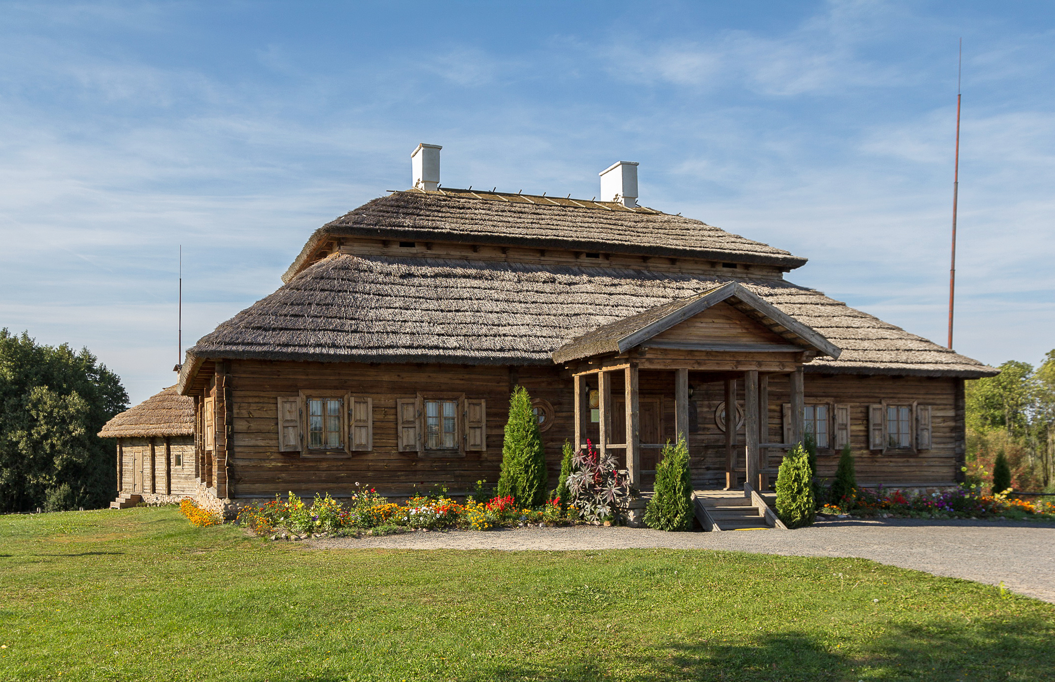 Беларуская (тарашкевіца): Косаўскі палацава-паркавы ансамбль: рэшткі былога палацу Пуслоўскіхмэмарыяльны музэй-сядзіба Т. Касьцюшкіфрагмэнты парку. г. Косава This is a photo of Belarusian heritage monument. Reference number: 111Г000305 ( WLM)